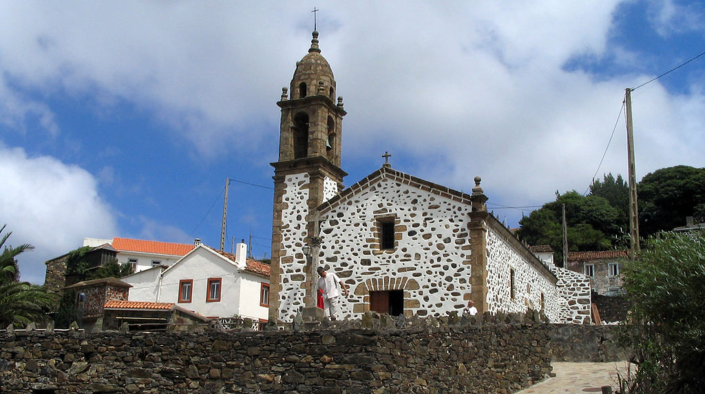 Igrexa de Santo André de Teixido - Cedeira - A Coruña